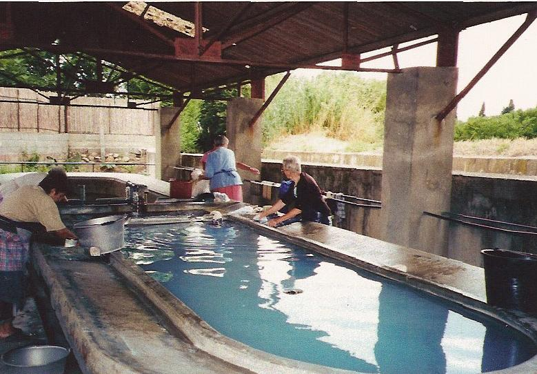 Lavoir_canohes.jpg